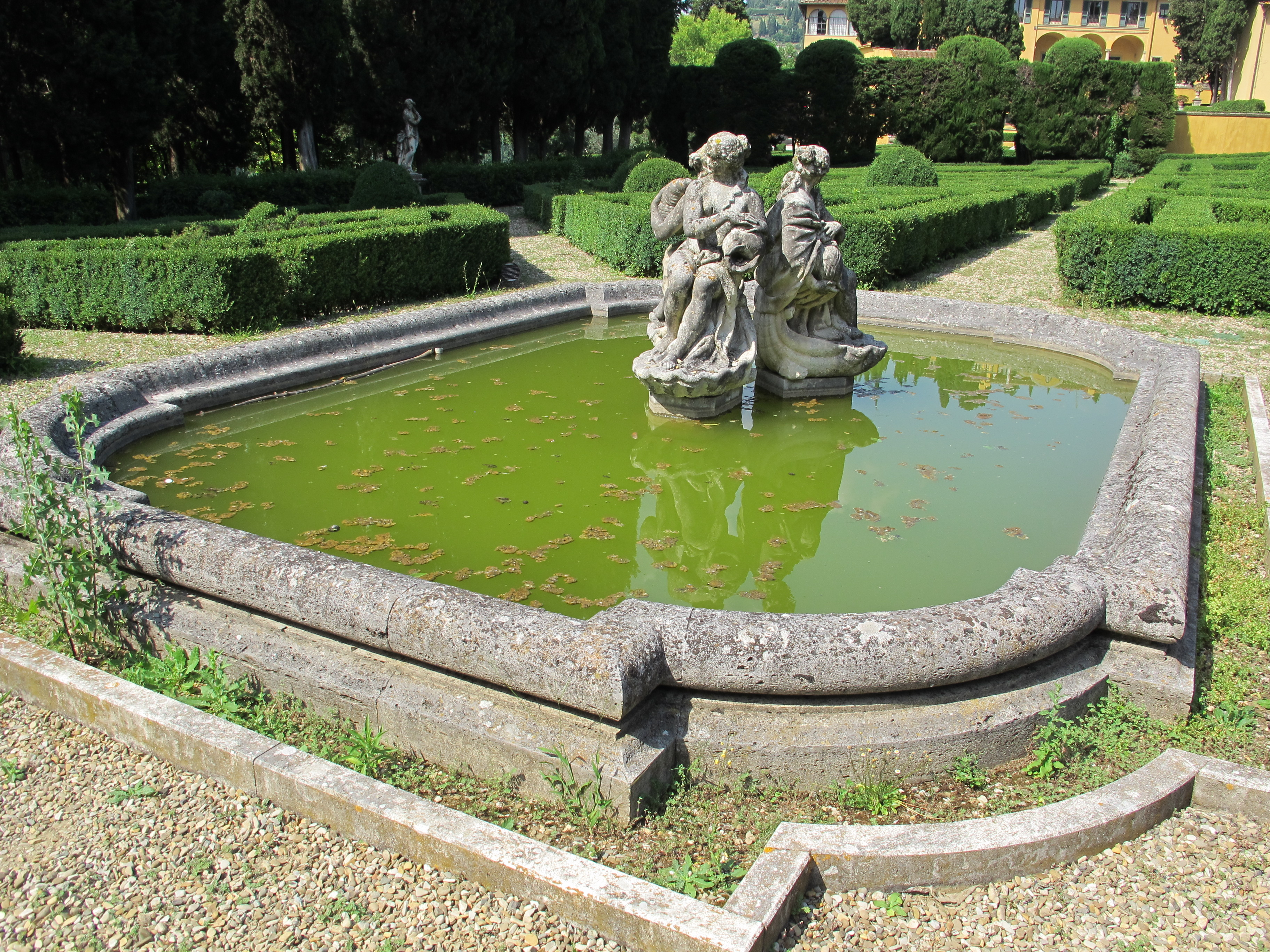 Villa schifanoia, giardino, terza terrazza, vasca centrale